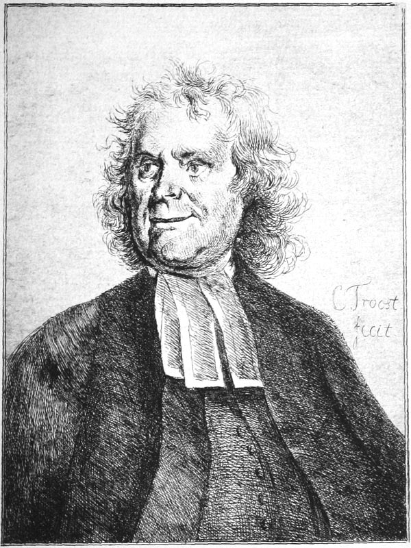 Herman Boerhaave - Project Gutenberg eText 15690